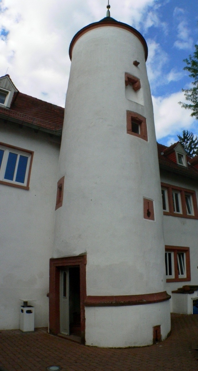 Kloster Höchst, Odenwald, Deutschland: Treppenturm